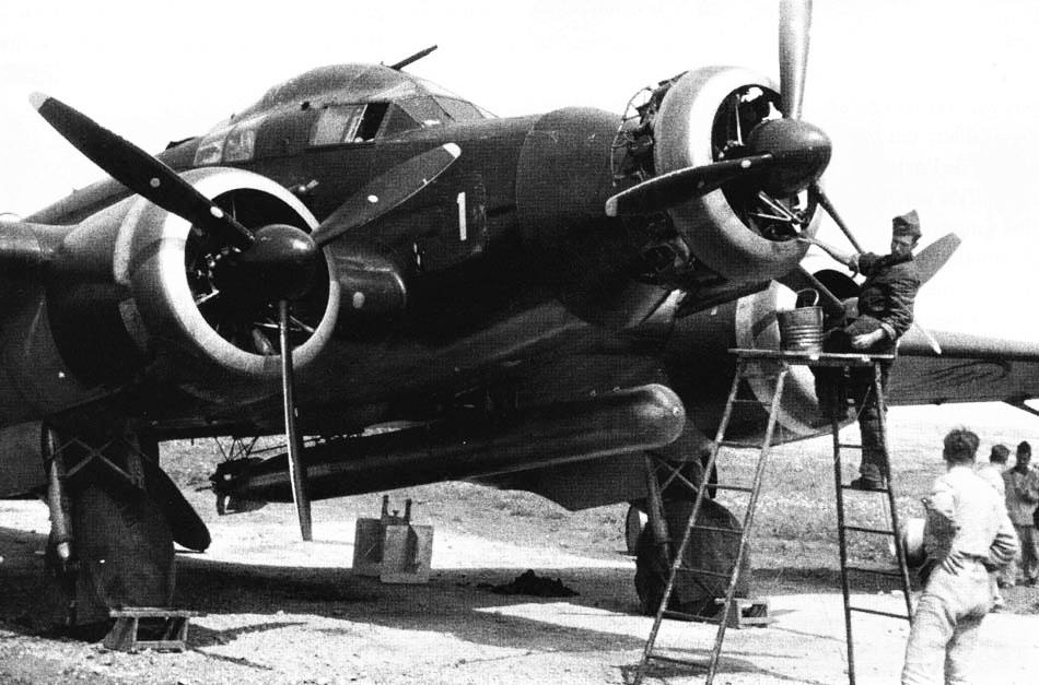 Aereo Savoia Marchetti SM.79bis